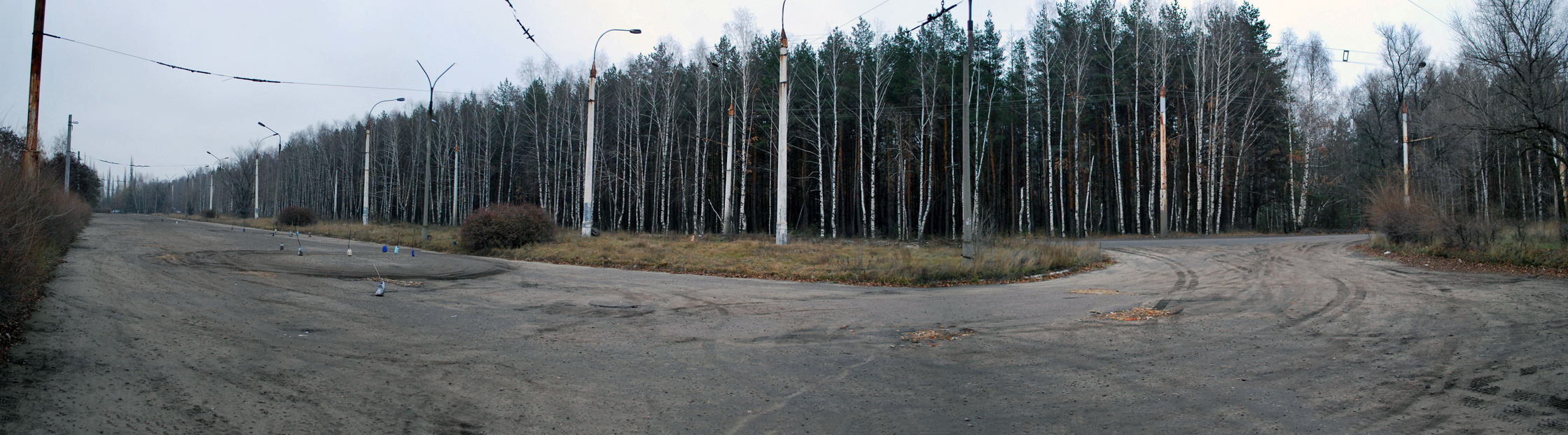 Троллейбусная конечная "ВЗСАК" в Воронеже